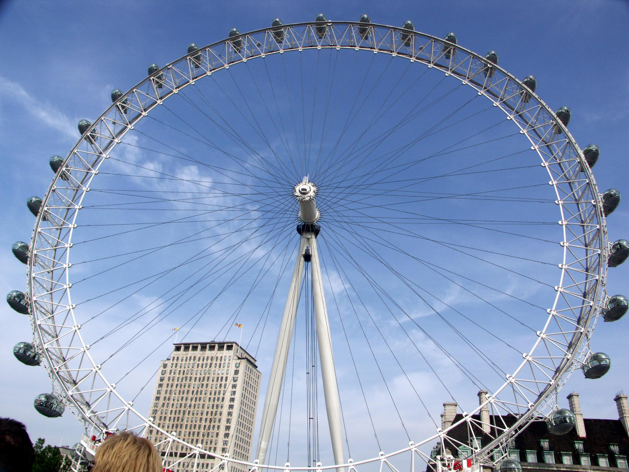 London Eye